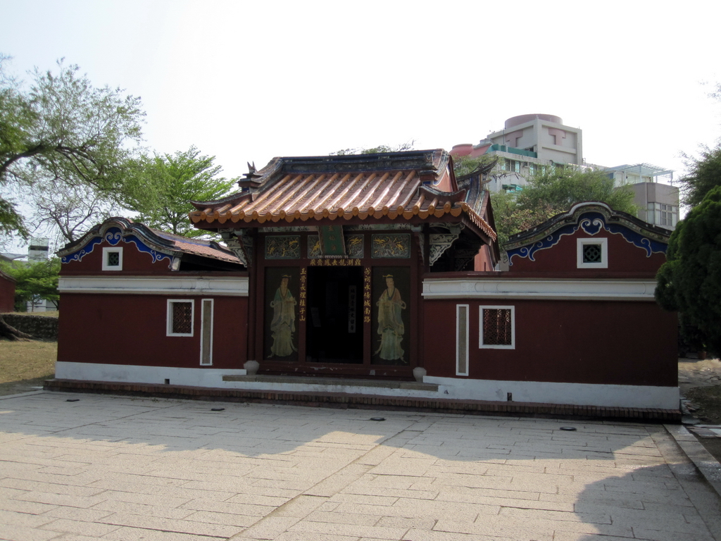 位於台南市的明甯靖王五妃廟